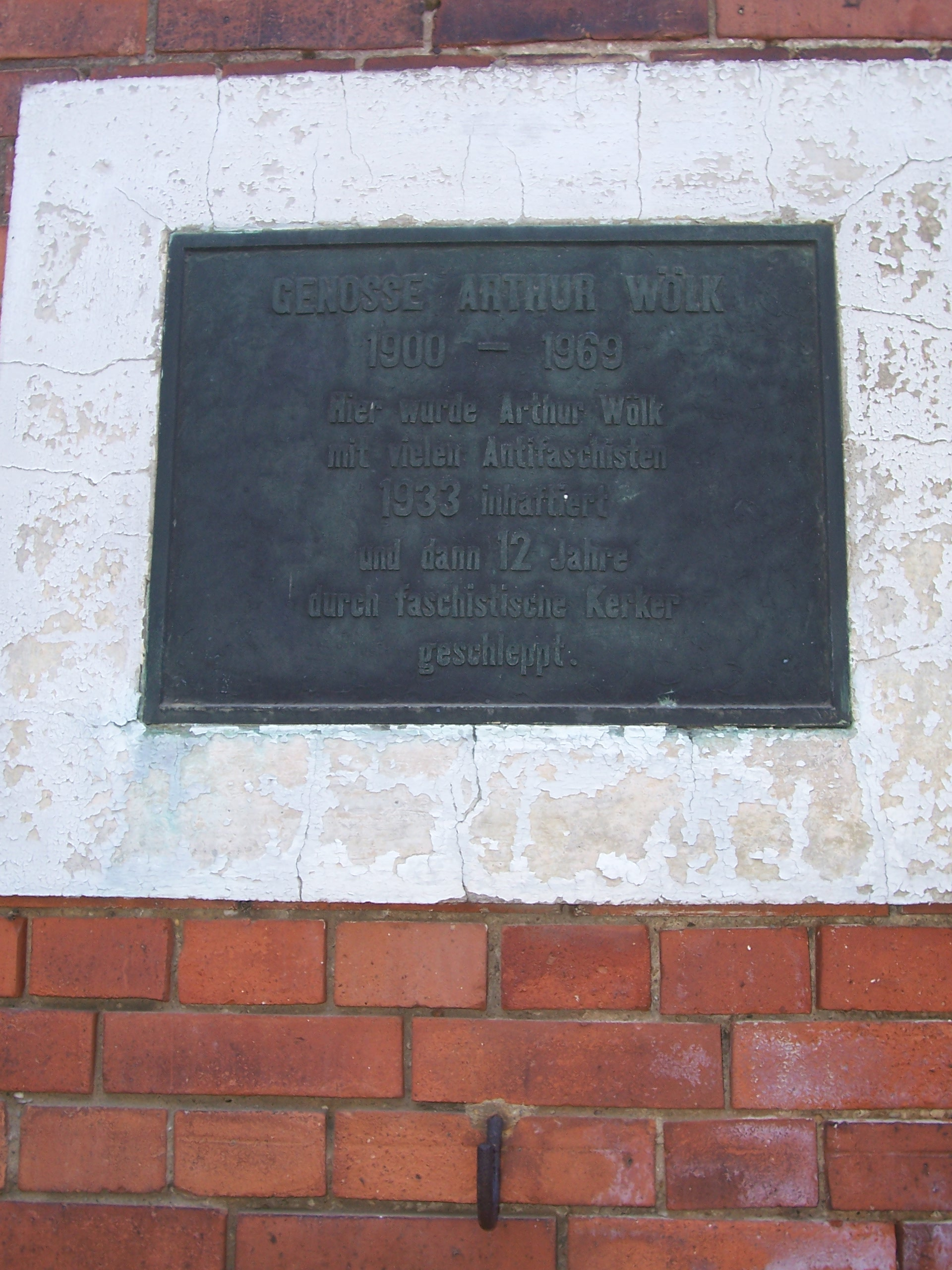 Gedenktafel auf dem Gelände der ehemaligen Realschule Senftenberg (Schulstraße)